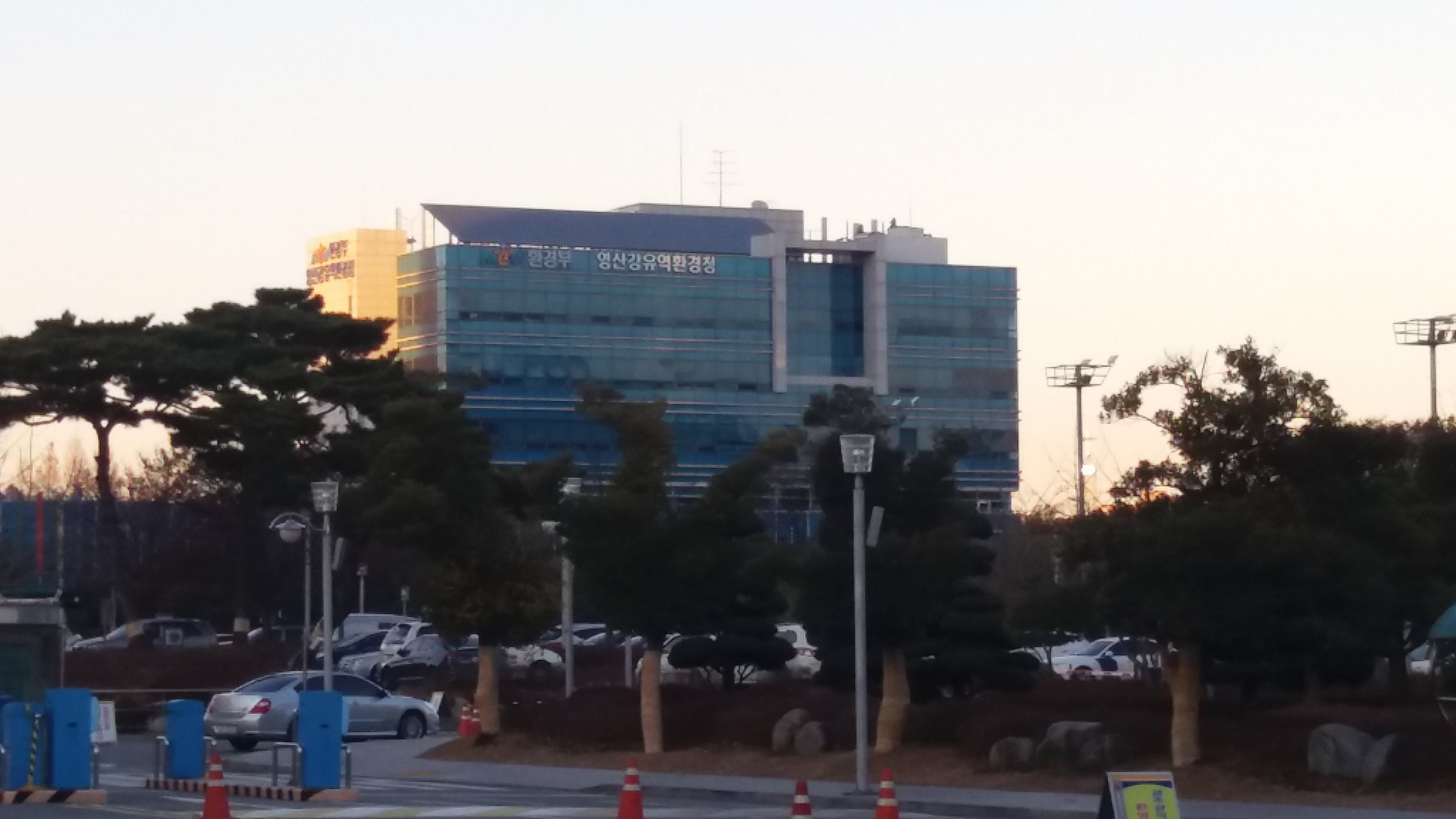 영산강유역환경청